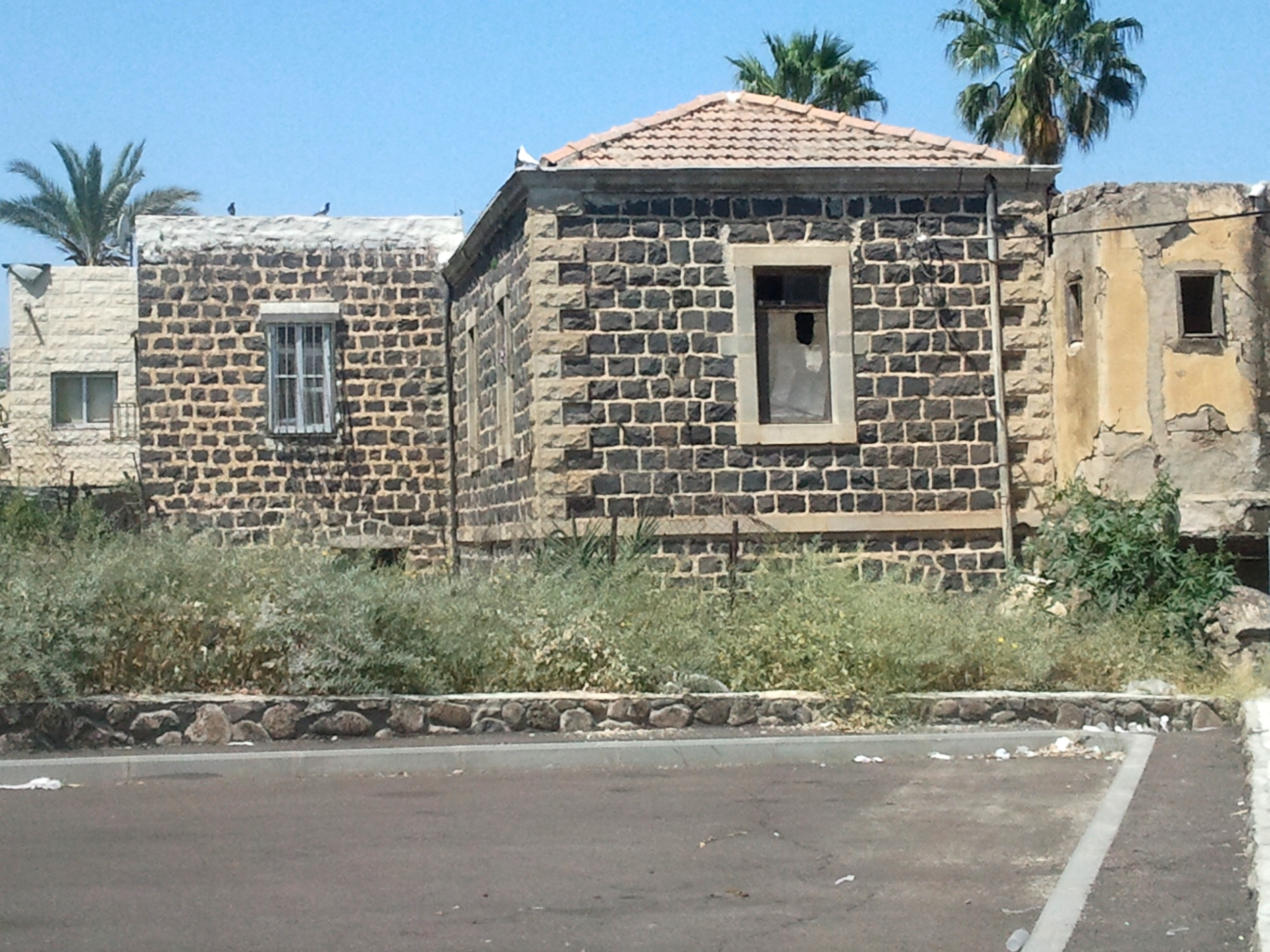 Tiberias